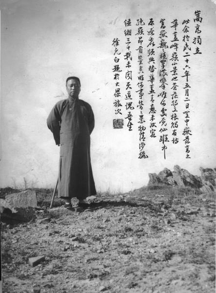 中文（中国大陆）: 徐元白民国二十六年（1937年）五月二日於嵩山華蓋峰